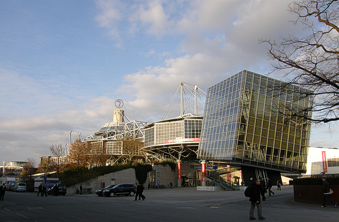 Auf dem Messegelände